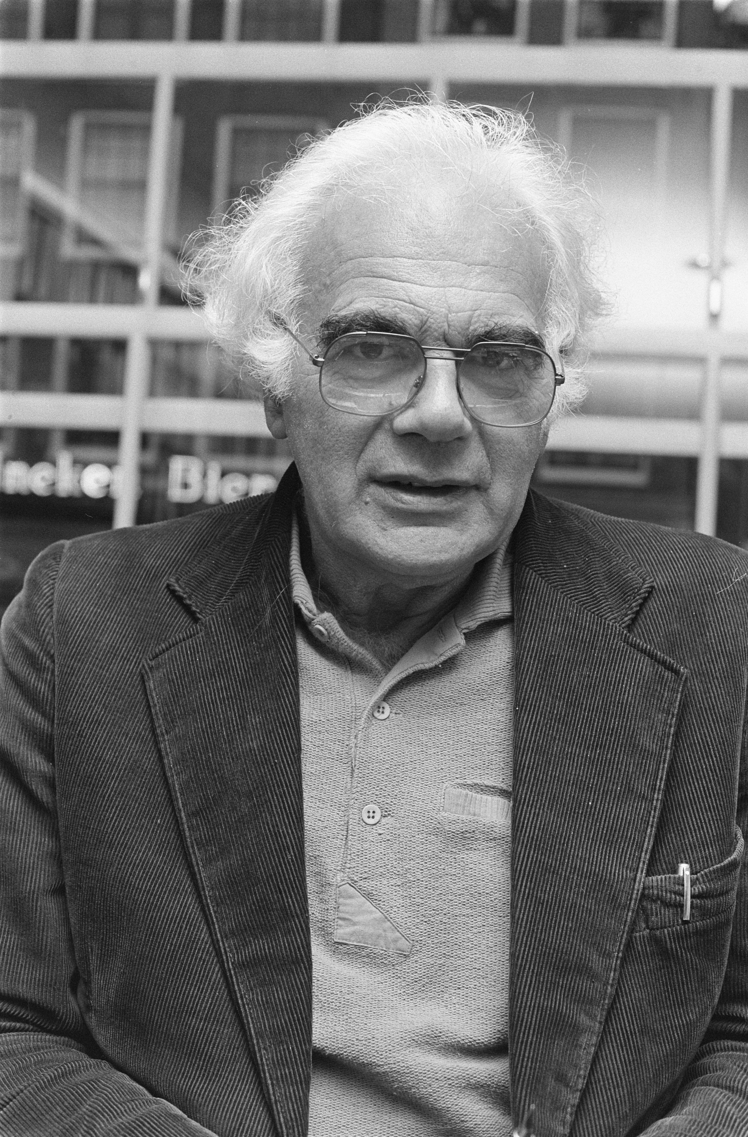 Collectie / Archief : Fotocollectie Anefo Reportage / Serie : [ onbekend ] Beschrijving : Sal Santen , schrijver Datum : 23 oktober 1982 Trefwoorden : portretten, schrijvers Persoonsnaam : Santen, Sal Fotograaf : Bogaerts, Rob / Anefo Auteursrechthebbende : Nationaal Archief Materiaalsoort : Negatief (zwart/wit) Nummer archiefinventaris : bekijk toegang 2.24.01.05 Bestanddeelnummer : 932-3745